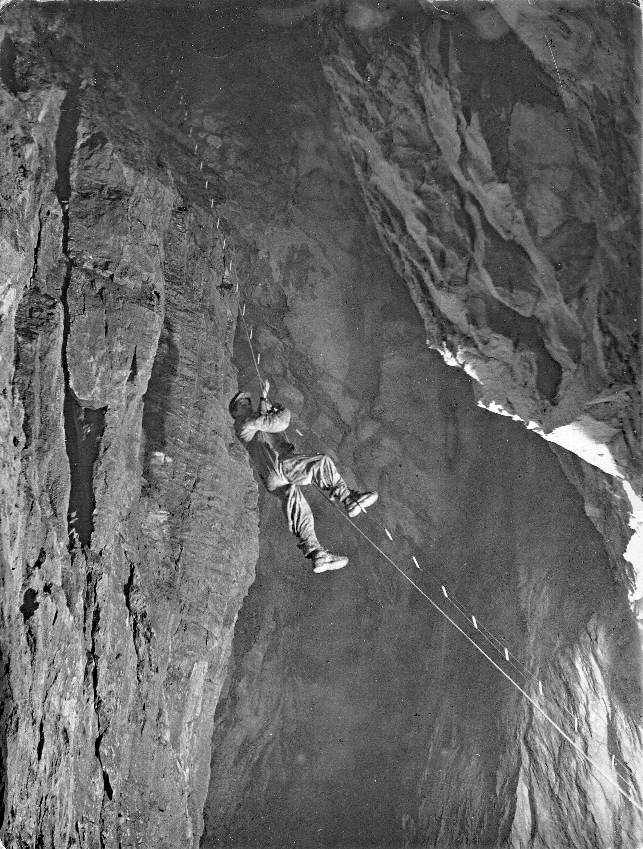 fotografia autorstwa Bernarda Uchmańskiego przedstawiająca Romana Bebaka wspinającego się po drabince w jednej ze studni Jaskini Czarnej w 1969